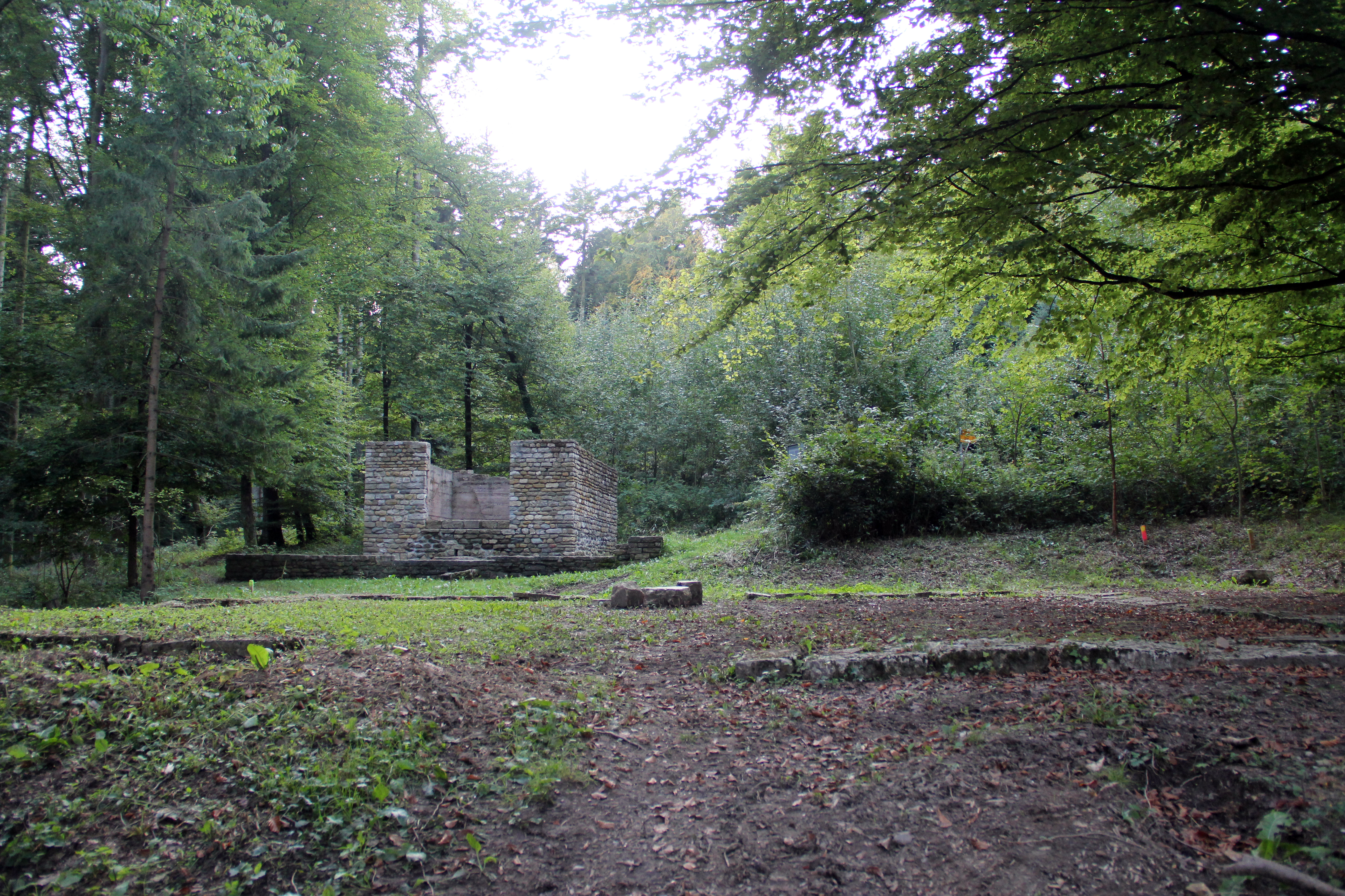 Petinesca (römischer Vicus/ Tempelbezirk) in Studen.